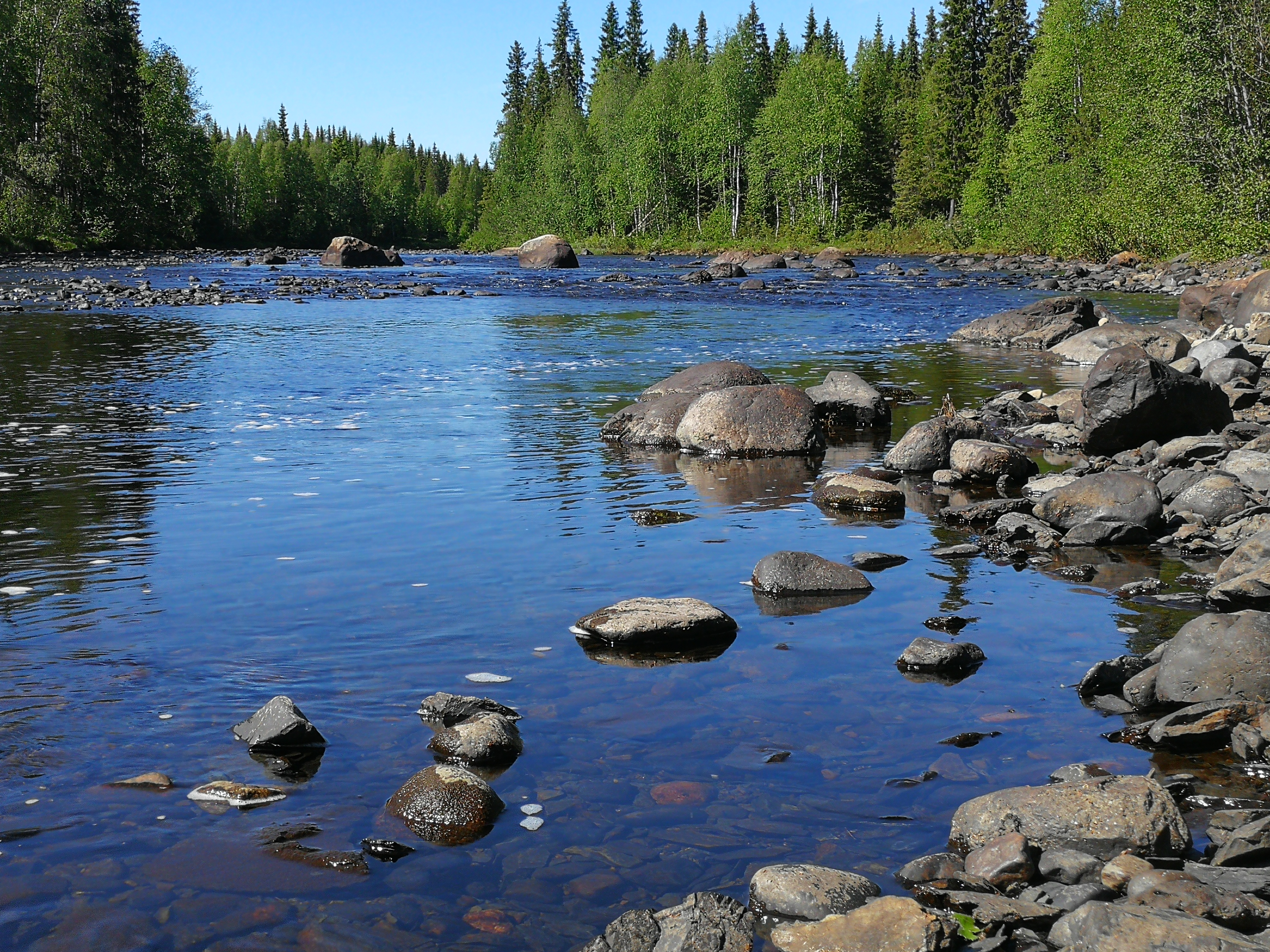 Yxskaftkälen